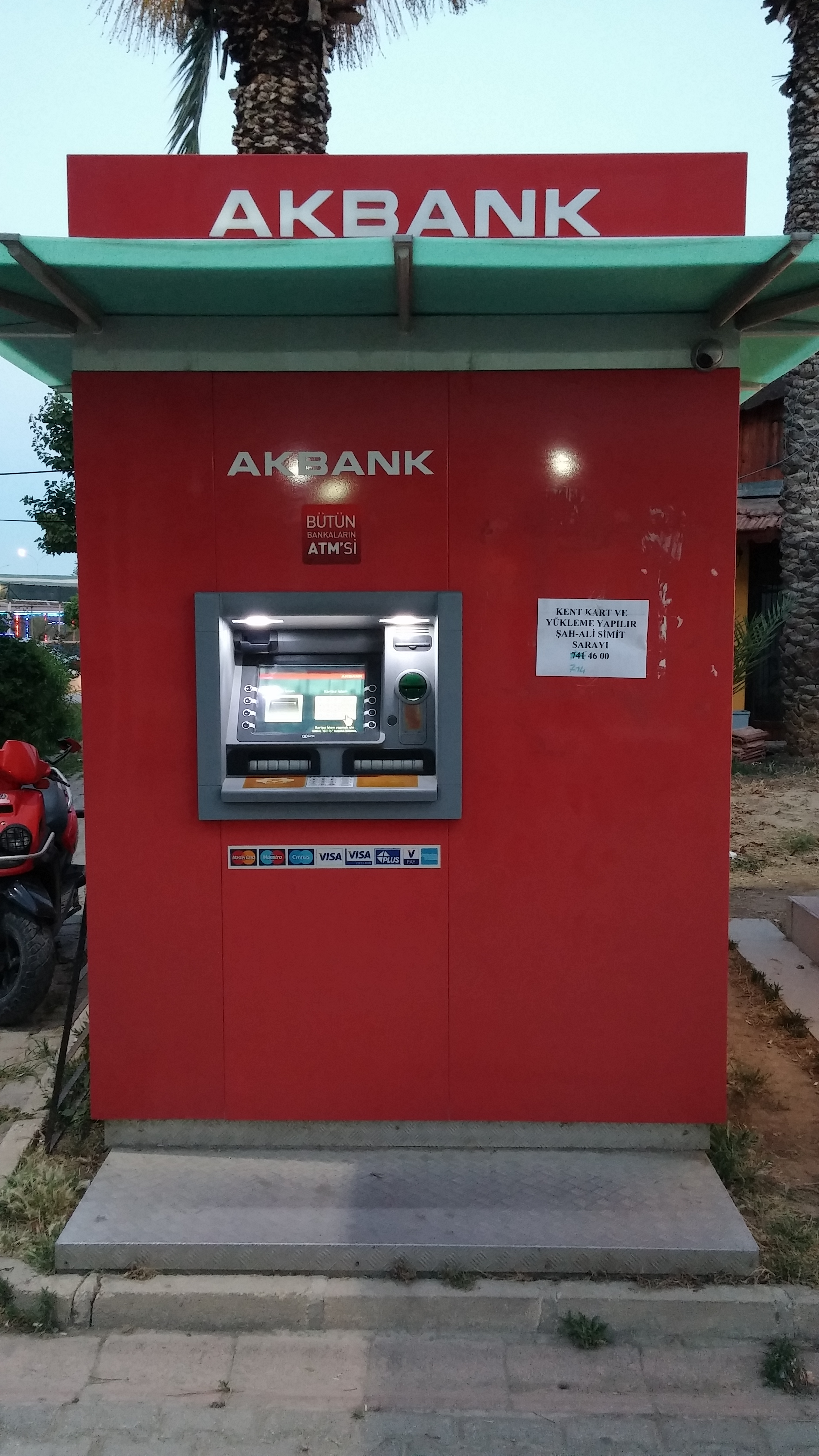 Taşucu'nda bir Akbank ATM'si.